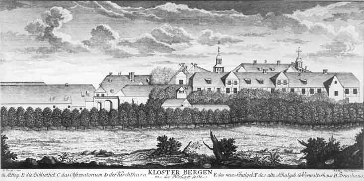 Ansicht des Klosters Berge aus Nordwesten, 1780